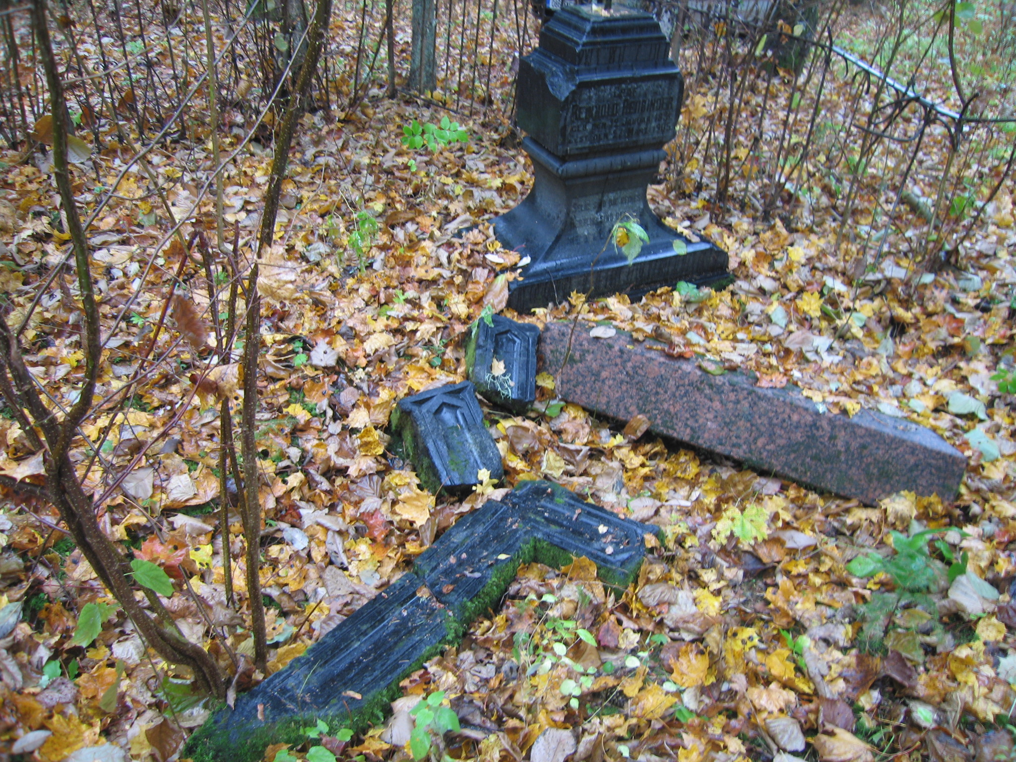 Reinhold Fabian von Rehbinderi hauatähis